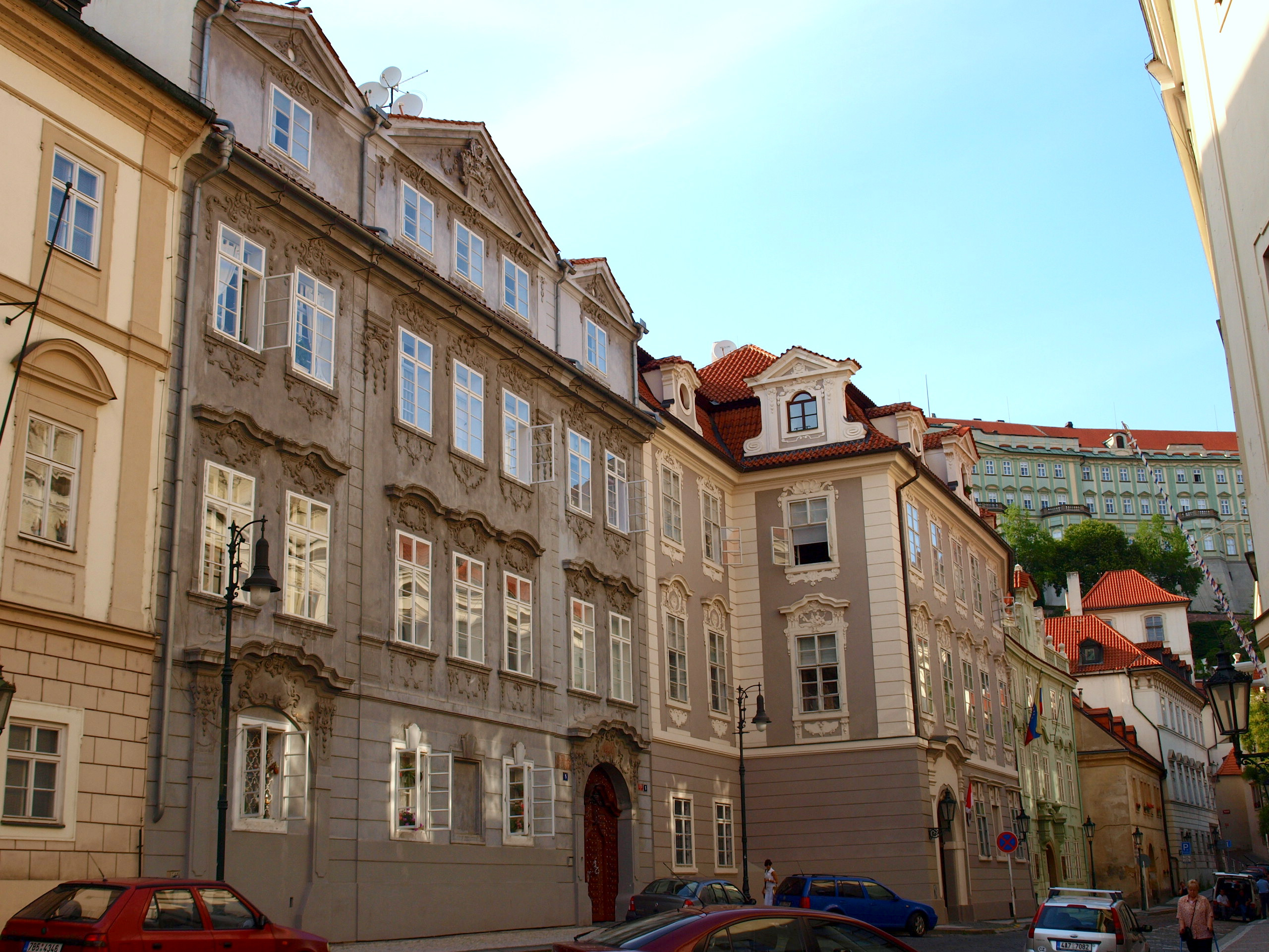 Palác Lažanských (Malá Strana)